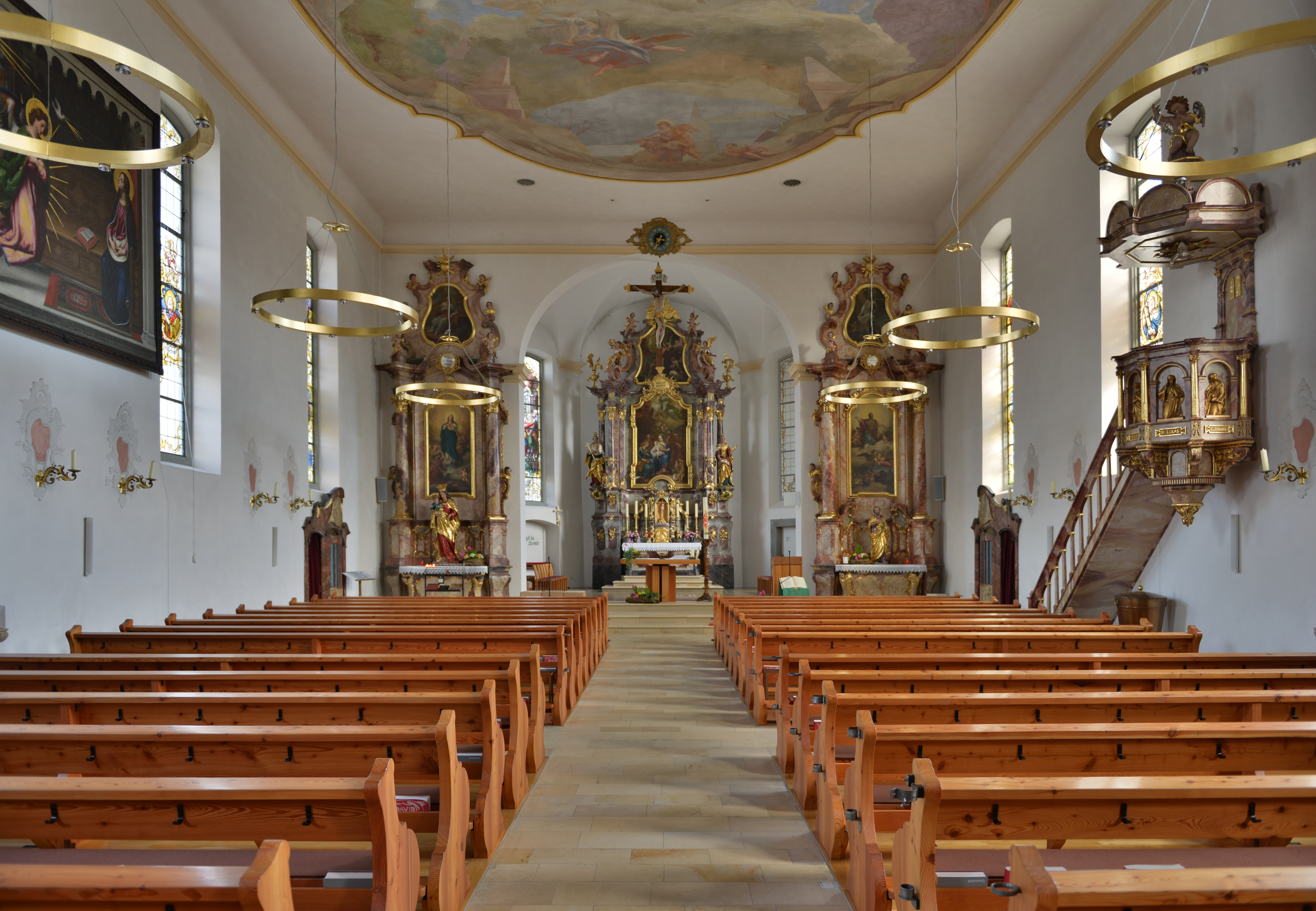 Pfarrkirche hl. Martin in Hörbranz. Kreuzwegstationen in der Apsis von Hubert Fessler 1954; Glasmalereien von der K. Bayerischen Hofglasmalerei F.X. Zettler, München 1895.